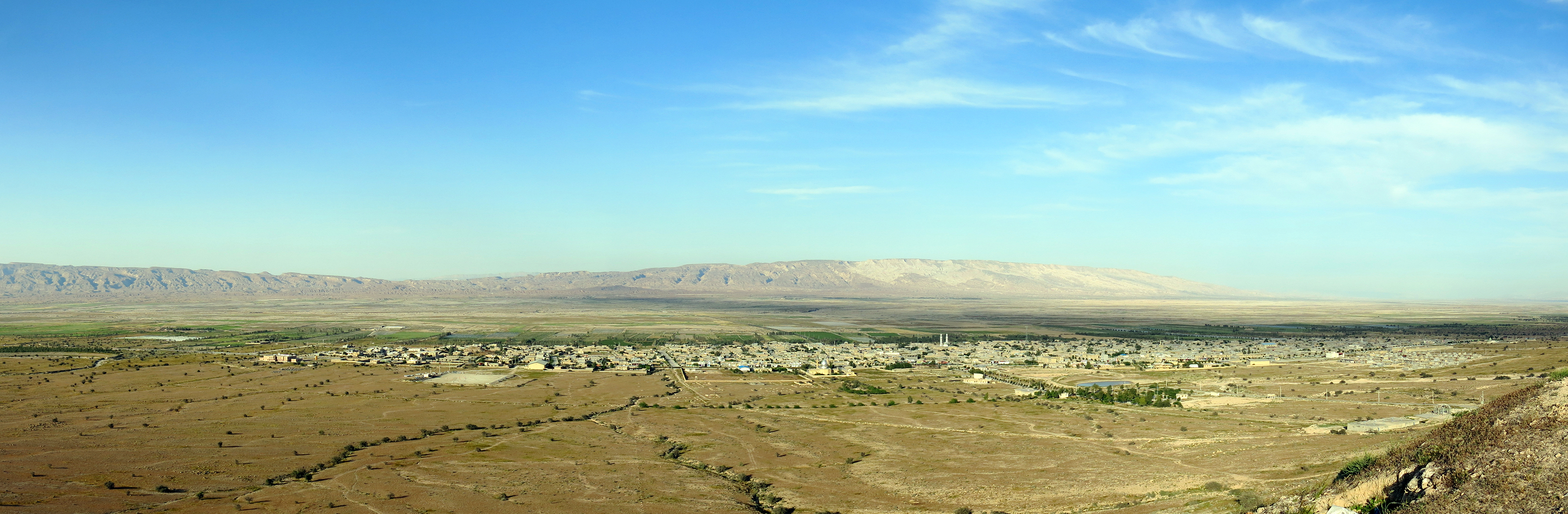 شهر علامرودشت، شهرستان لامرد، استان فارس